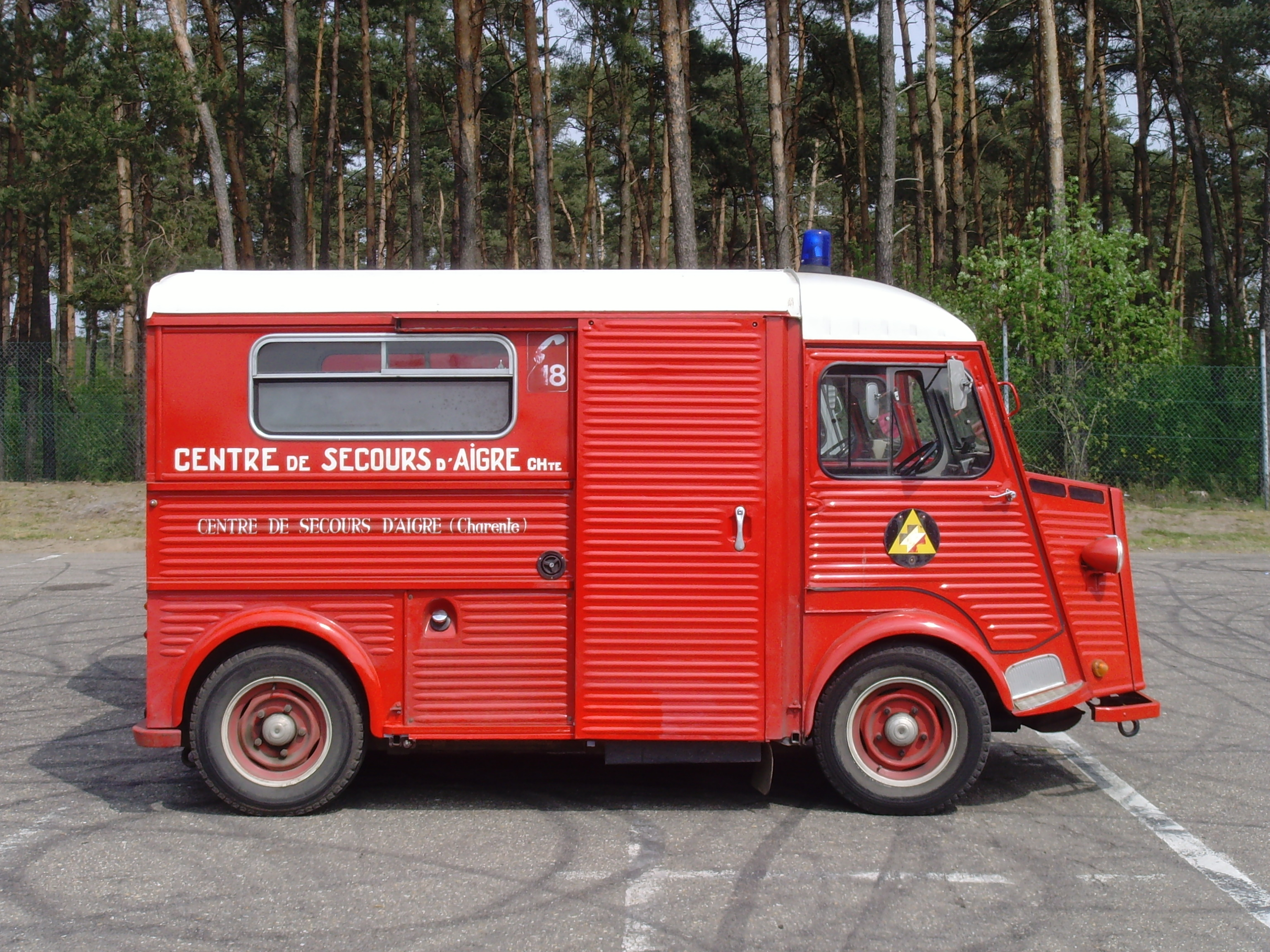 Citroen Story 2010 Circuit Zolder 115